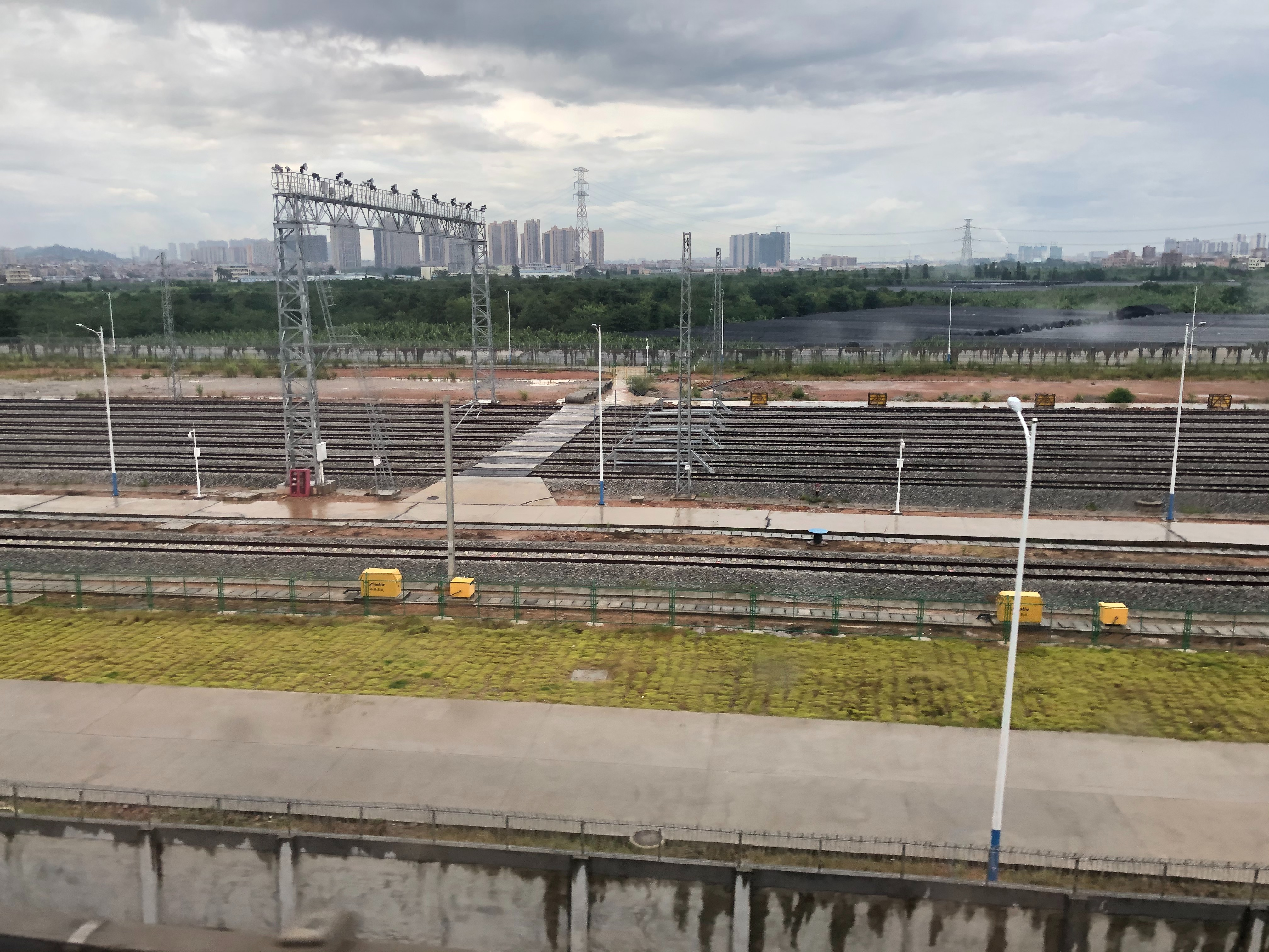 东莞市, 中国, August 2020